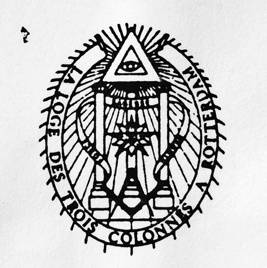 Seal of a Dutch Masonic Lodge